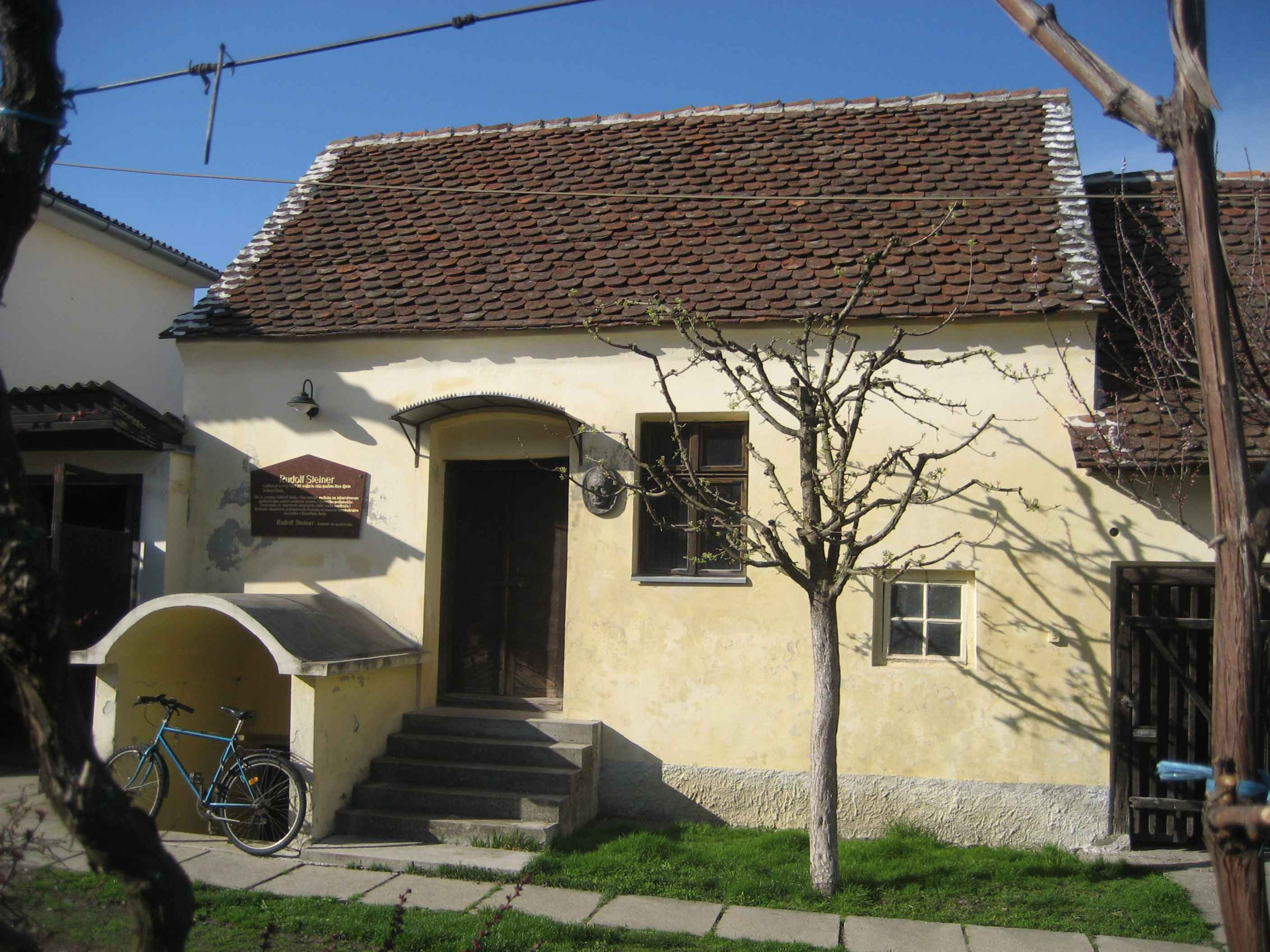 Geburtshaus von Rudolf Steiner, Donji Kraljevec, Croatia Rodna kuca, Rudolfa Steinera, Donji Kraljevec, Hrvatska